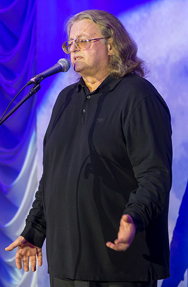 Александр Градский в 2014 году в Приднестровье